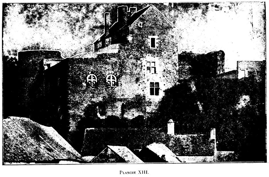 Le Donjon de Courmenant, ses origines, ses seigneurs et possesseurs, son musée